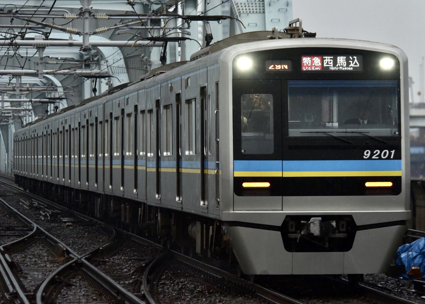 千葉ニュータウン鉄道9200形9201F 特急西馬込